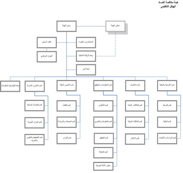 Organization Structure